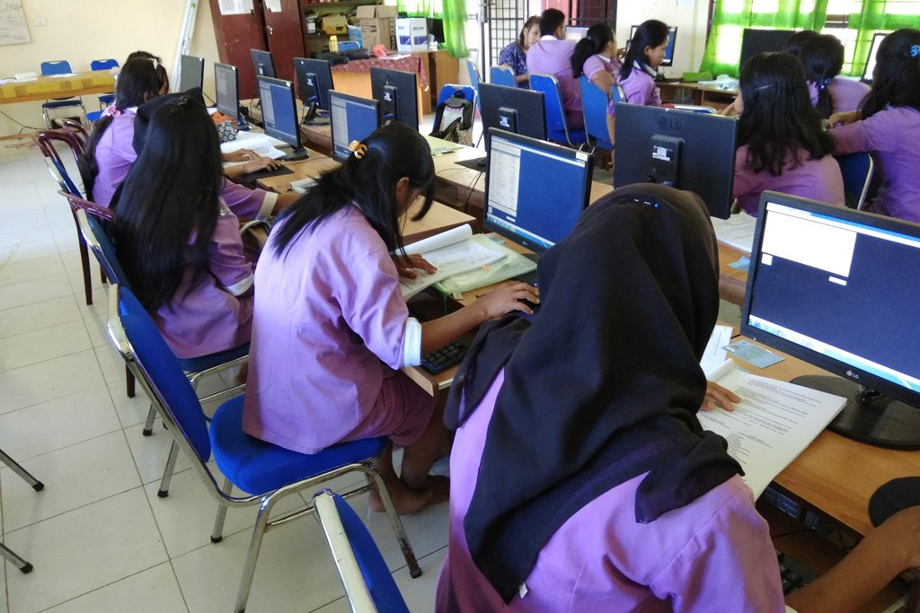 Kegiatan belajar Peserta Didik Program Keahlian Akuntansi dan Keuangan Lembaga